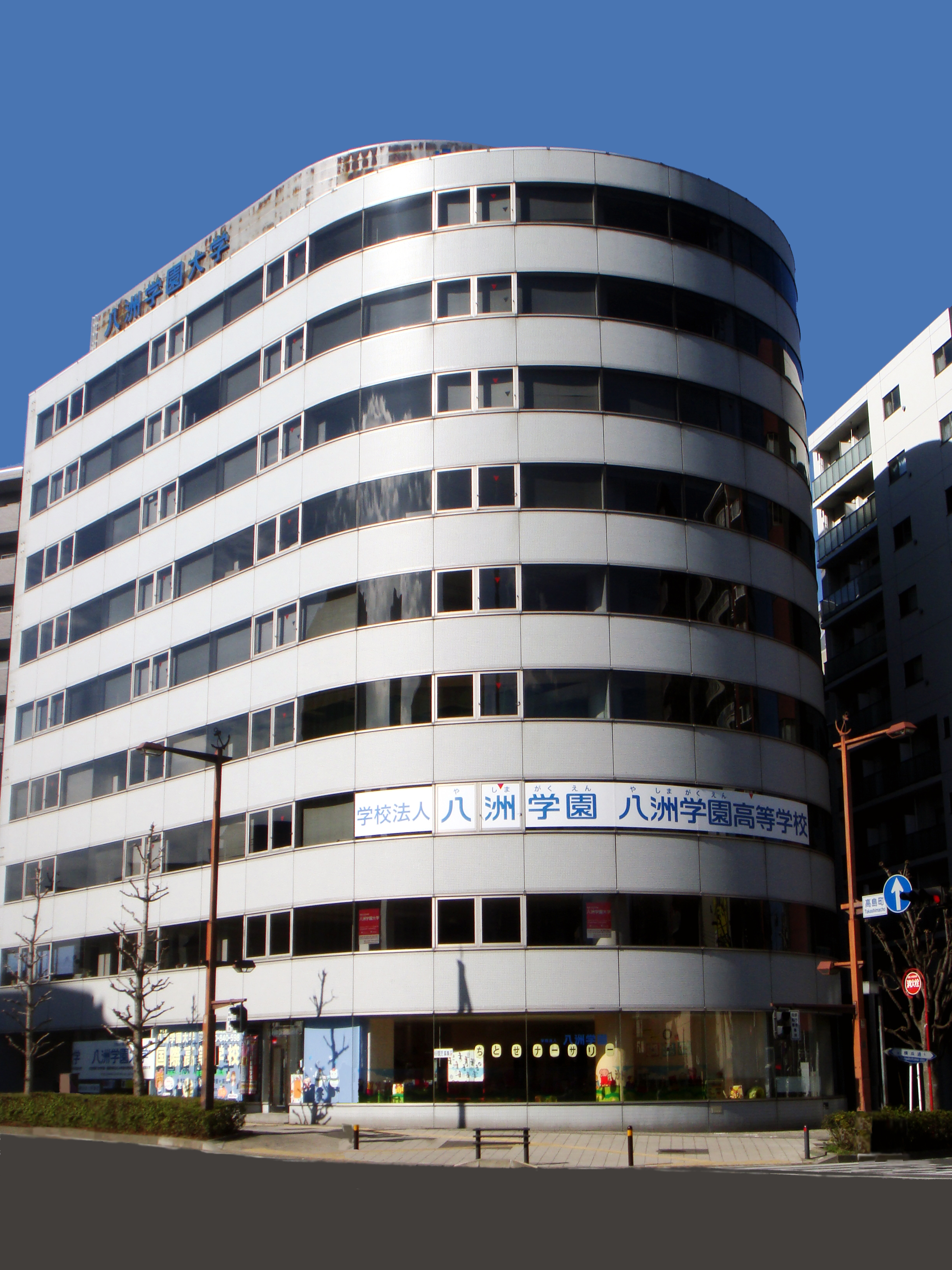 八洲学園高校 横浜分校写真